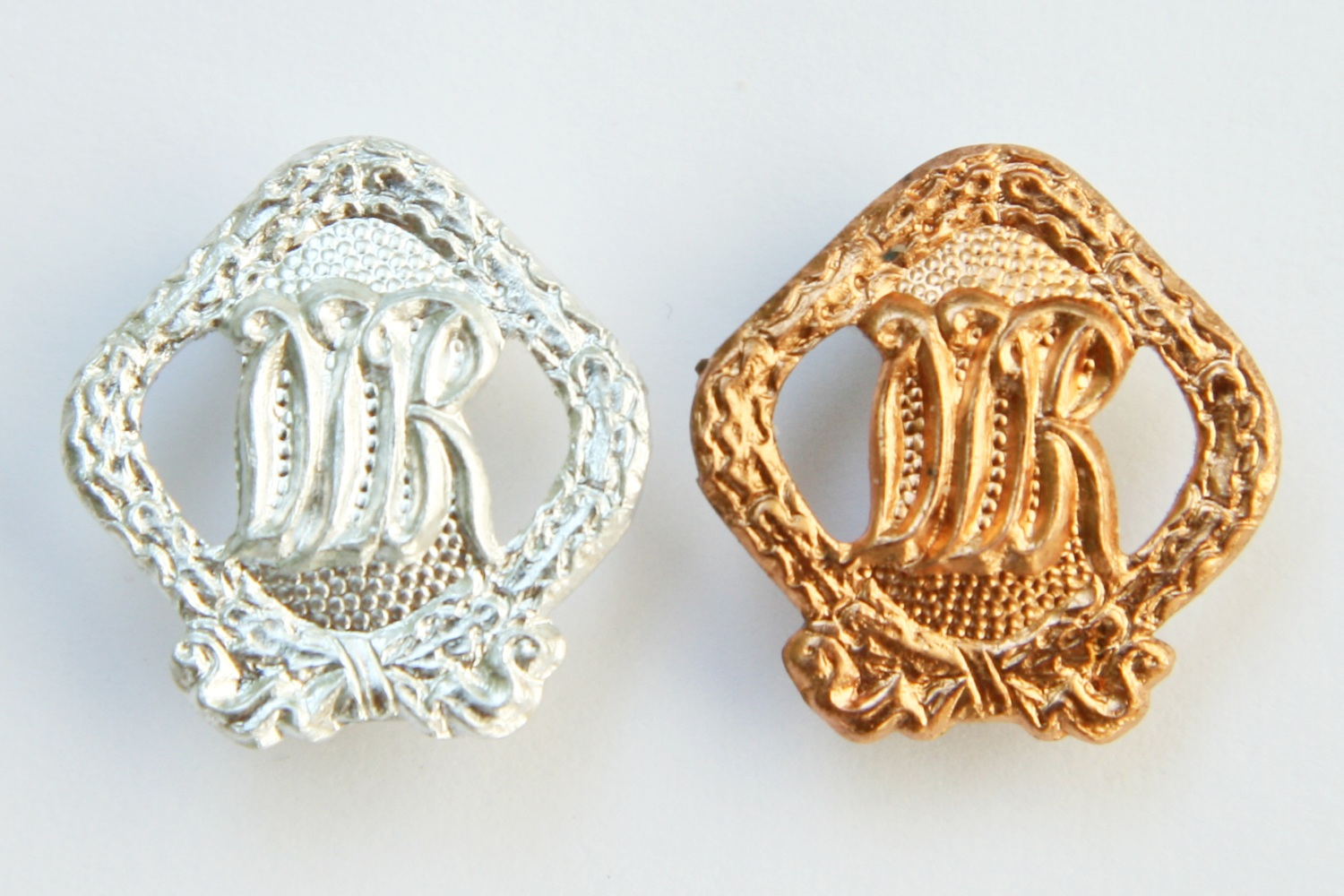 Sportabzeichen der DDR für Kinder in Silber und Bronze aus den 1980er Jahren, Höhe 20mm